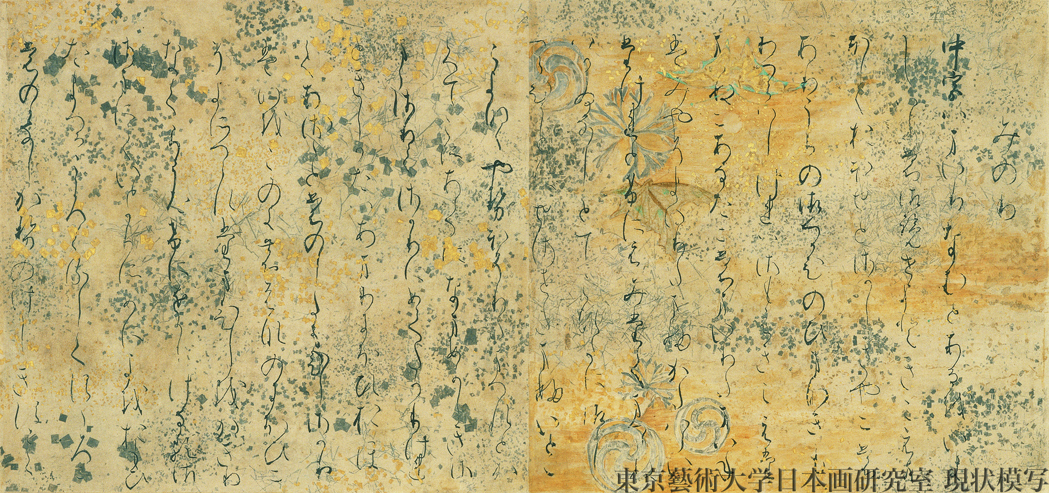 紙本墨色／一面 平安時代後期・12世紀 縦21.8cm 横46.6cm 五島美術館蔵